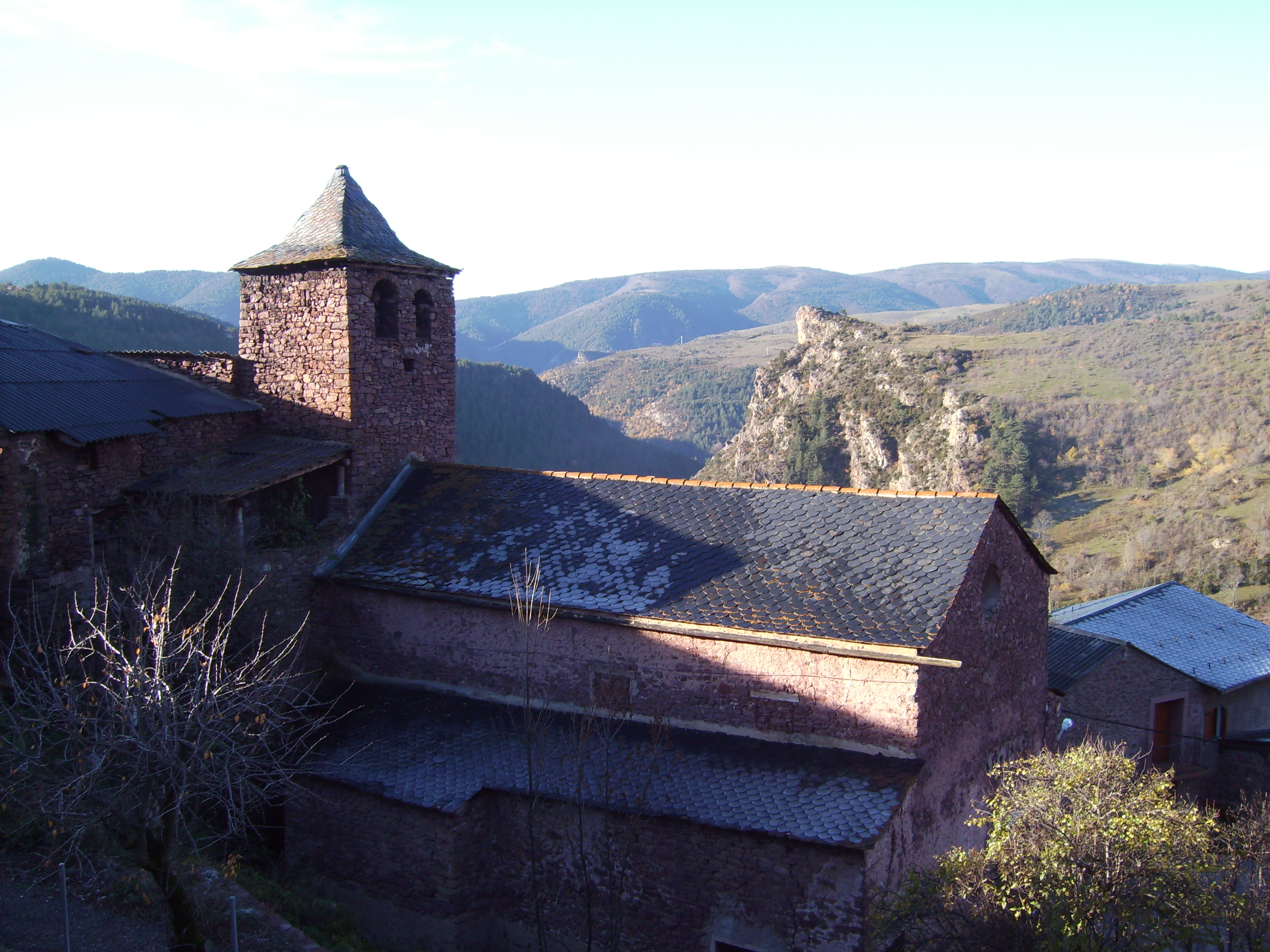 Guils del Cantó, Alt Urgell, Catalonia